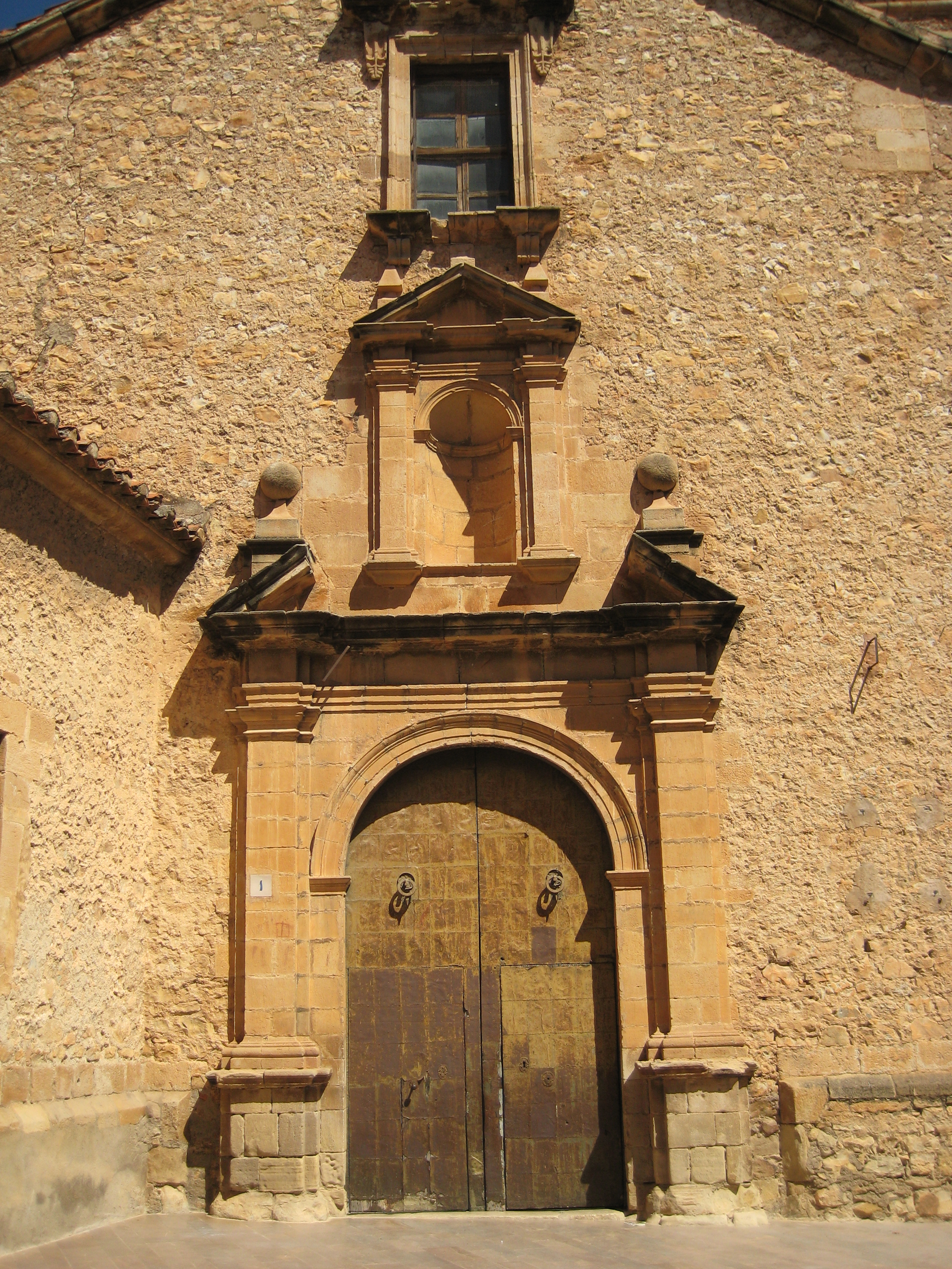 Portada principal de l'església de Sant Bartomeu d'Atzeneta del Maestrat (l'Alcalatén)